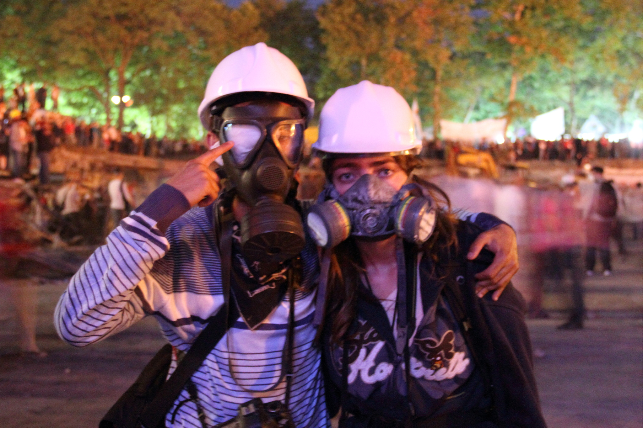 Gezi Parkı Müdahale